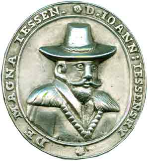 Potrait von Jan Jessenius, Rektor der Prager Karls-Universität auf einer Medaille aus dem Jahr 1618, vermutlich Prag